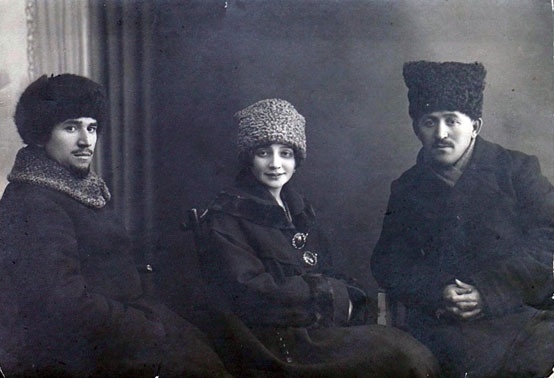 Sultan Galiyev, Fatma Erzin ve İsmail Kerimcanov Firdevs 1919